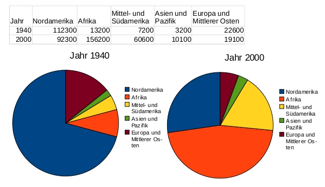 Diagram über die Mitgliederentwicklung der Quäker Welt weit.